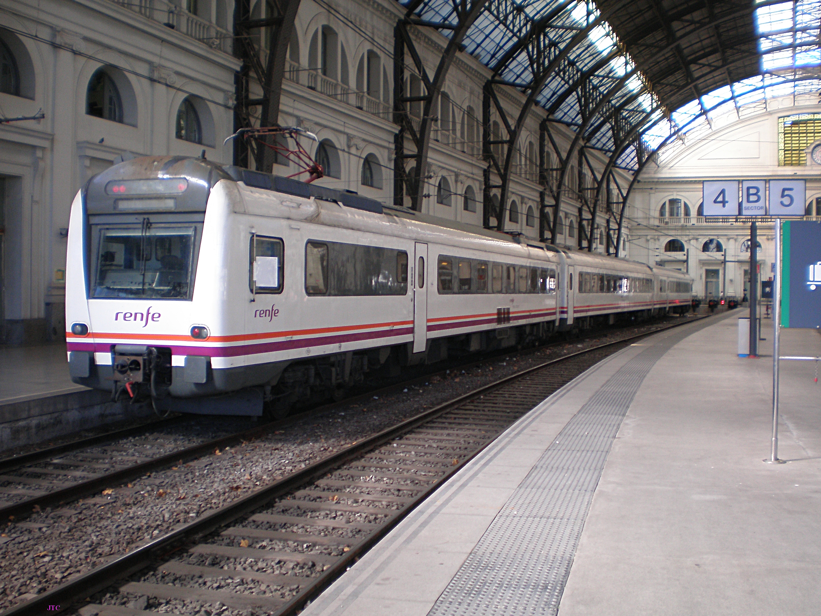 Una unidad eléctrica de la serie 448 de Renfe Operadora en la Estació de França de Barcelona.